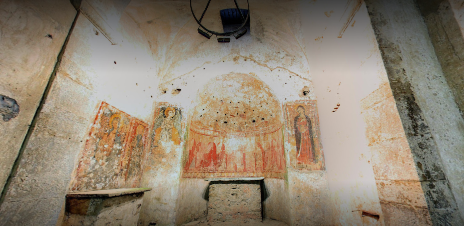 Affreschi presenti nella chiesa di sotterra